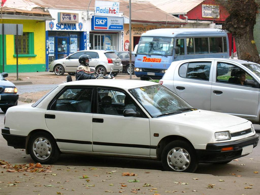 Daihatsu Applause L 1.6 1992